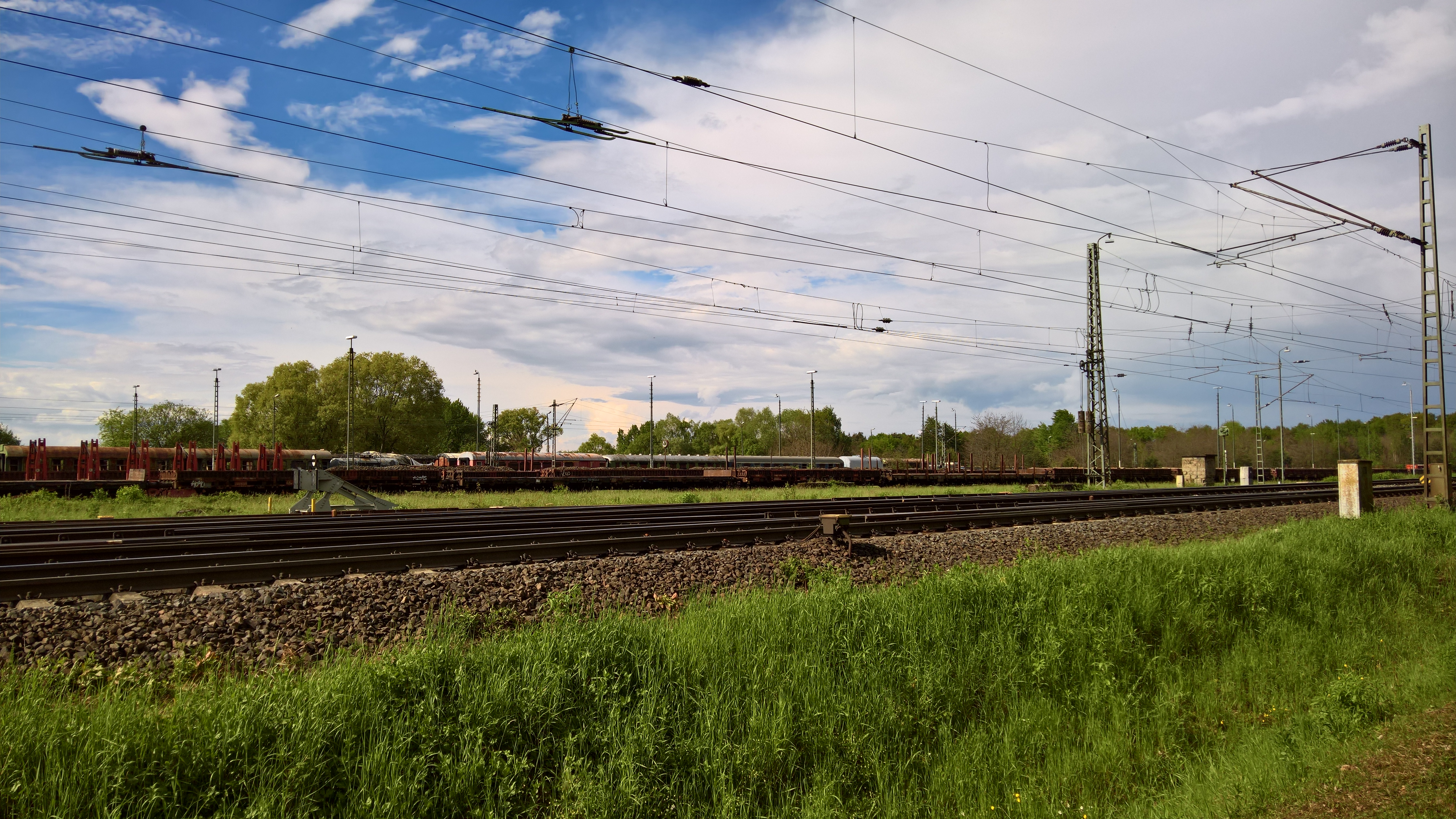 Der ehemaliges Rangierbahnhof Kranichstein teilt das Naturdenkmal "Wasserfläche mit Gehölz und Schilf bei Darmstadt-Arheilgen" in den hier hinter den Glieisen liegenden Teil Gewann "Auf der Platte" und den südlichen Teil (Standort des Fotografen) "An der Kieskaute" südöstlich des Rangierbahnhofs, der hinter dem Bahnhof Darmstadt-Kranichstein und dem Eisenbahnmuseum Darmstadt-Kranichstein noch ca. eineinhalb Kilometer östlich hinausreicht